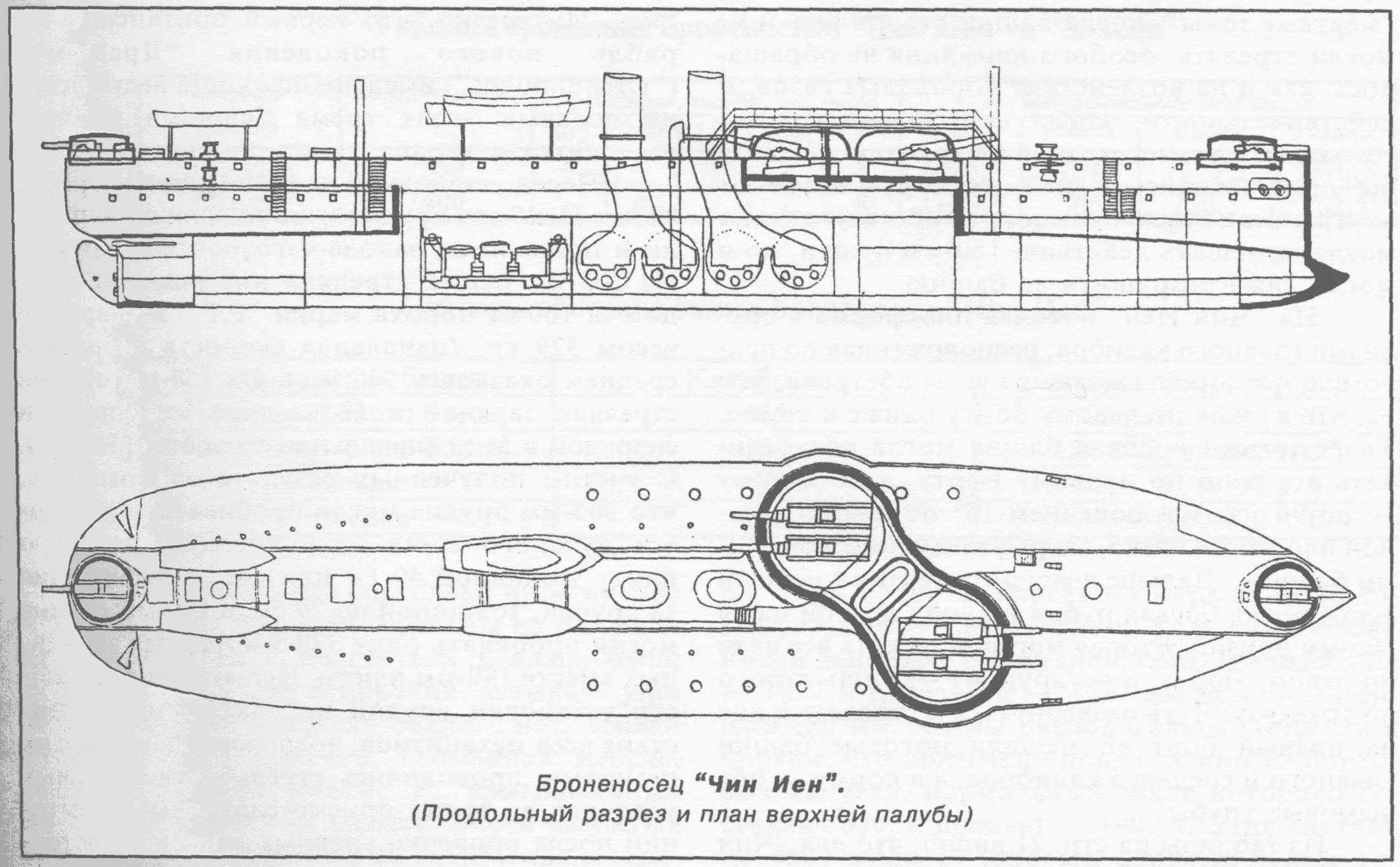 Схема броненосца "Чин-Иен"